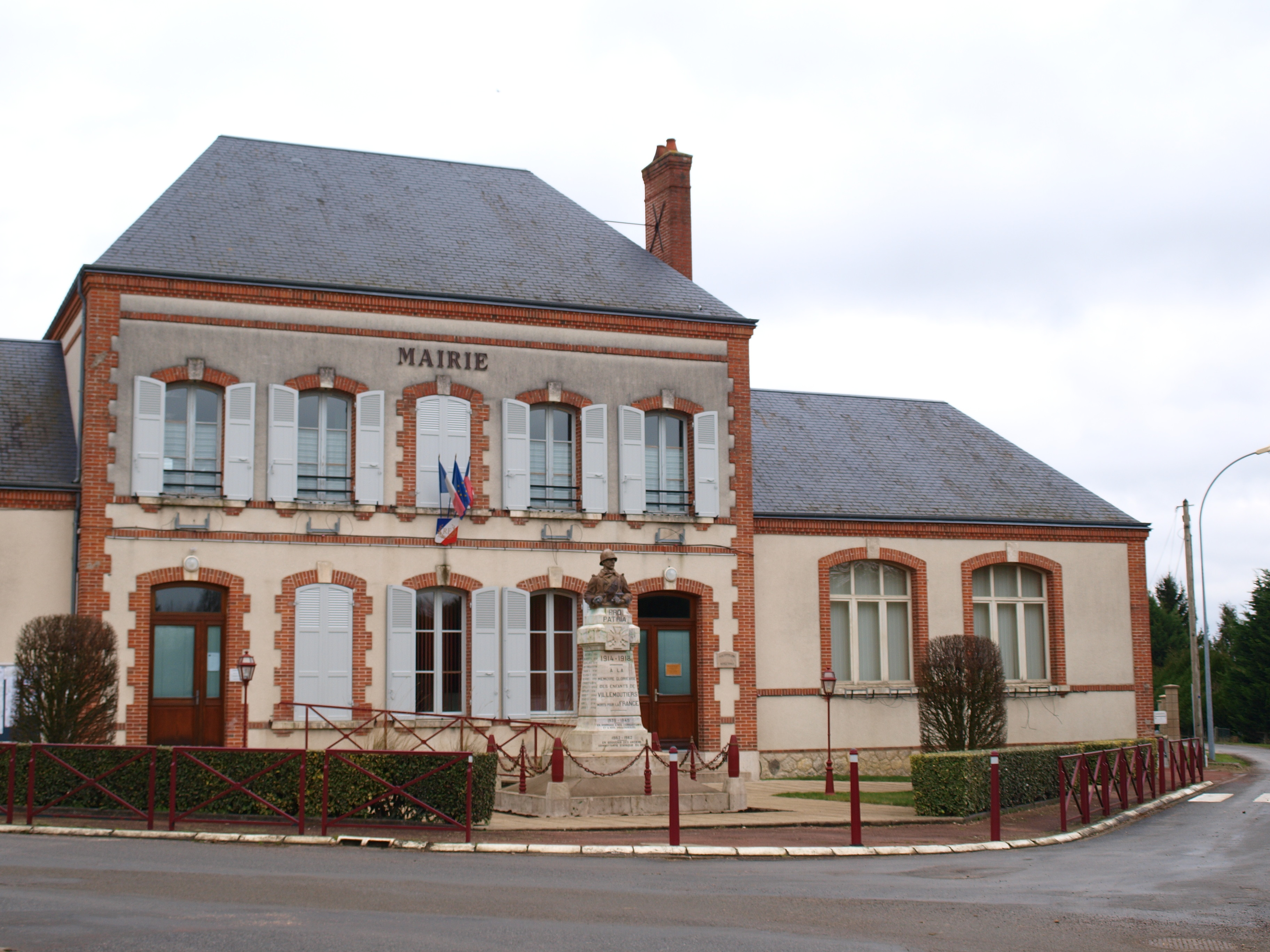 Villemoutiers (Loiret, France) ; mairie